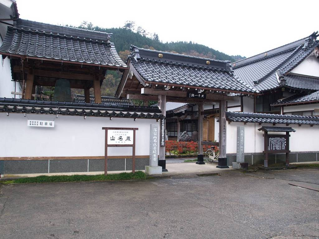 法雲寺境内